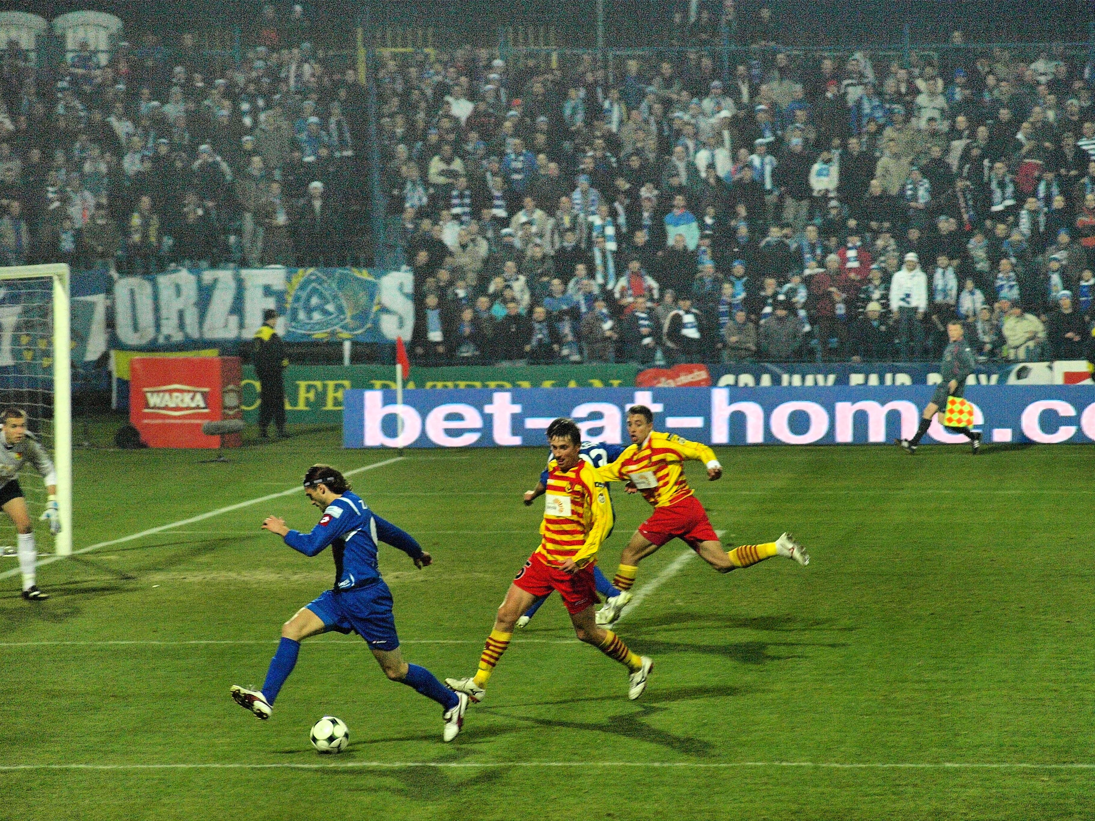 Mecz ekstraklasy Ruch-Jagiellonia z 9.11.2009.